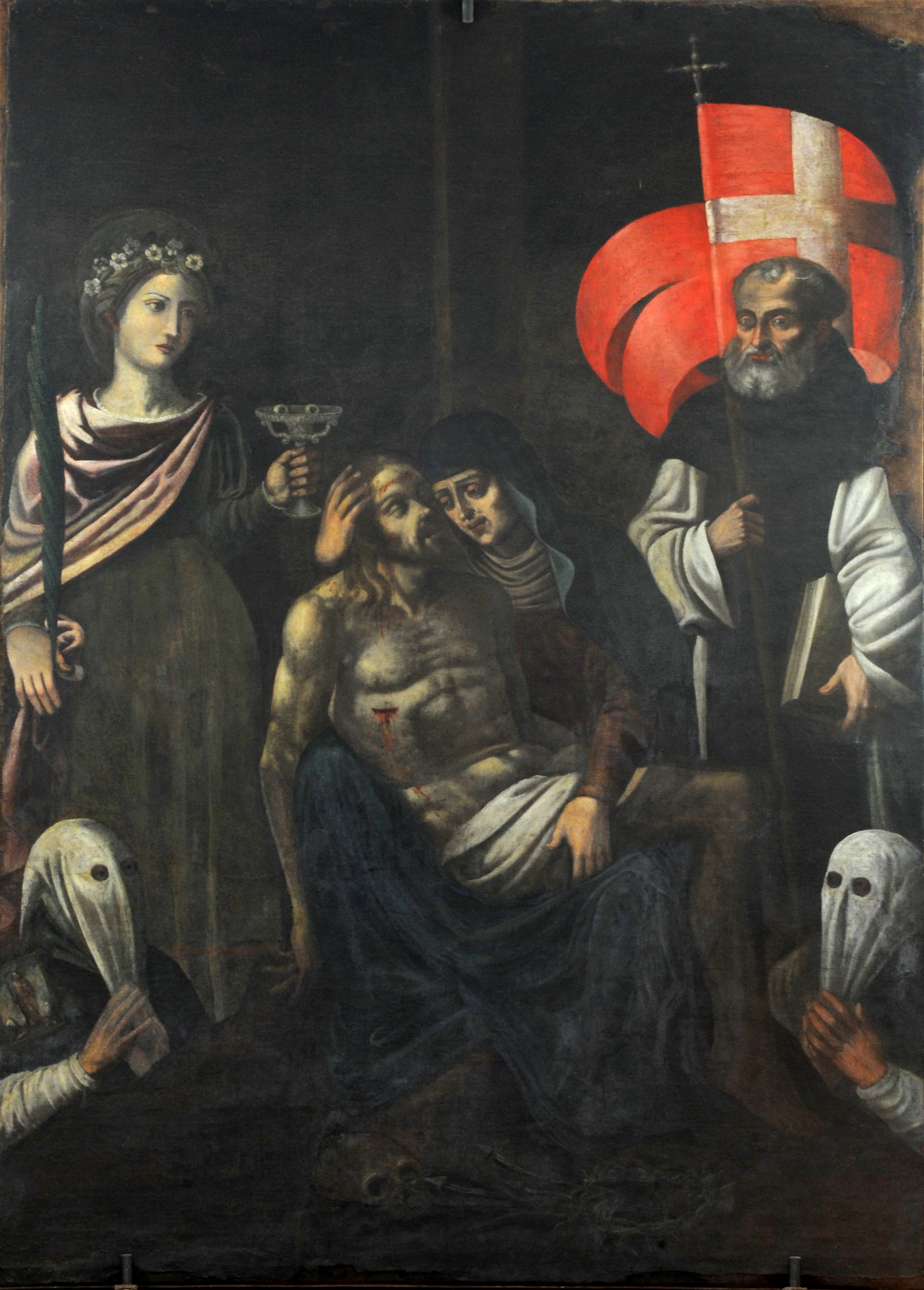 Pietà tra santi Aniello e Lucia, autore ignoto